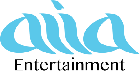 Logo-Asia